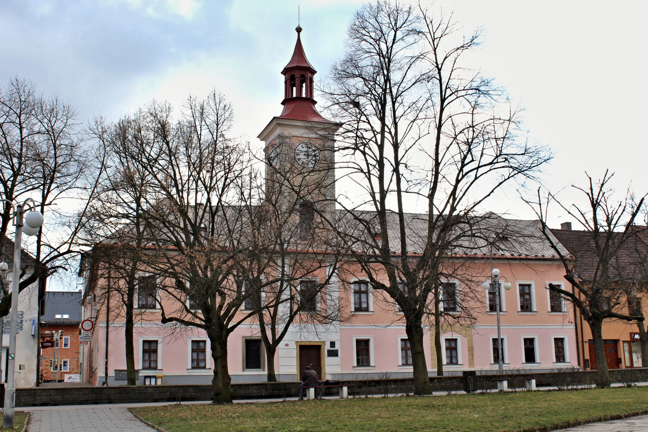 Nové Strašecí